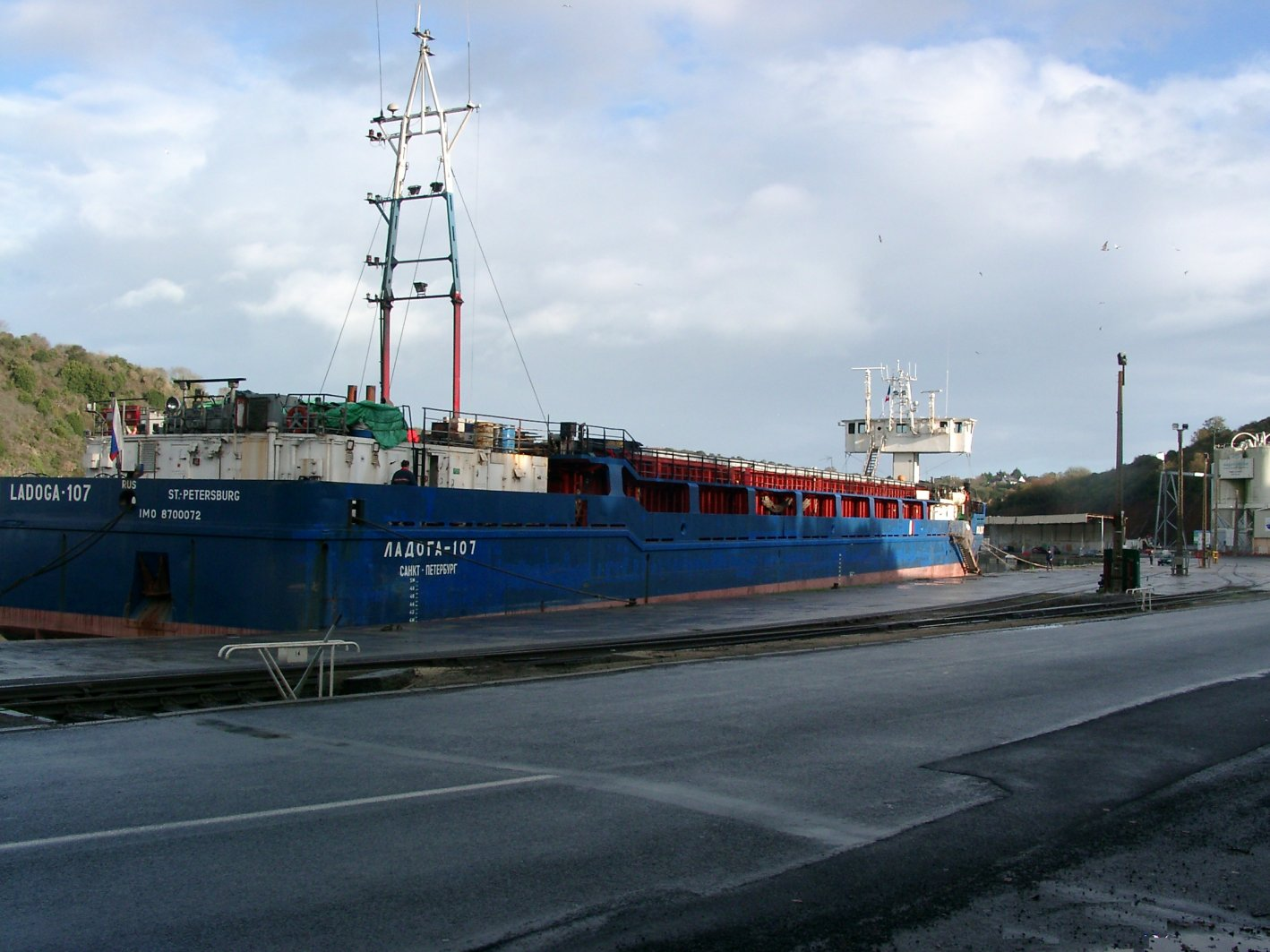 Bateau russe à quai au port du Légué (Saint-Brieuc, Côtes d'Armor, France)